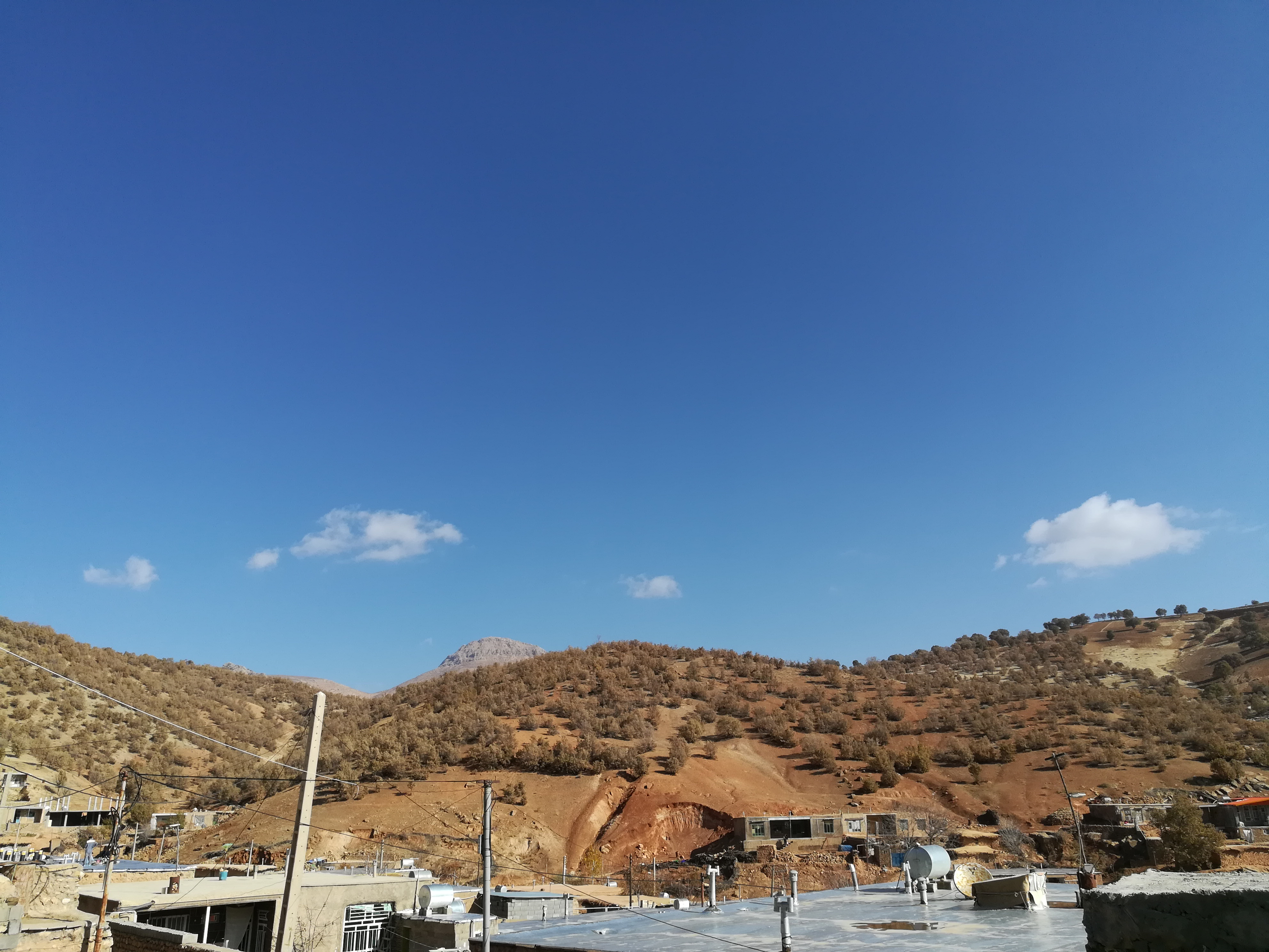 این تصویر یک روستا از چهار محال بختیاری در ایران است